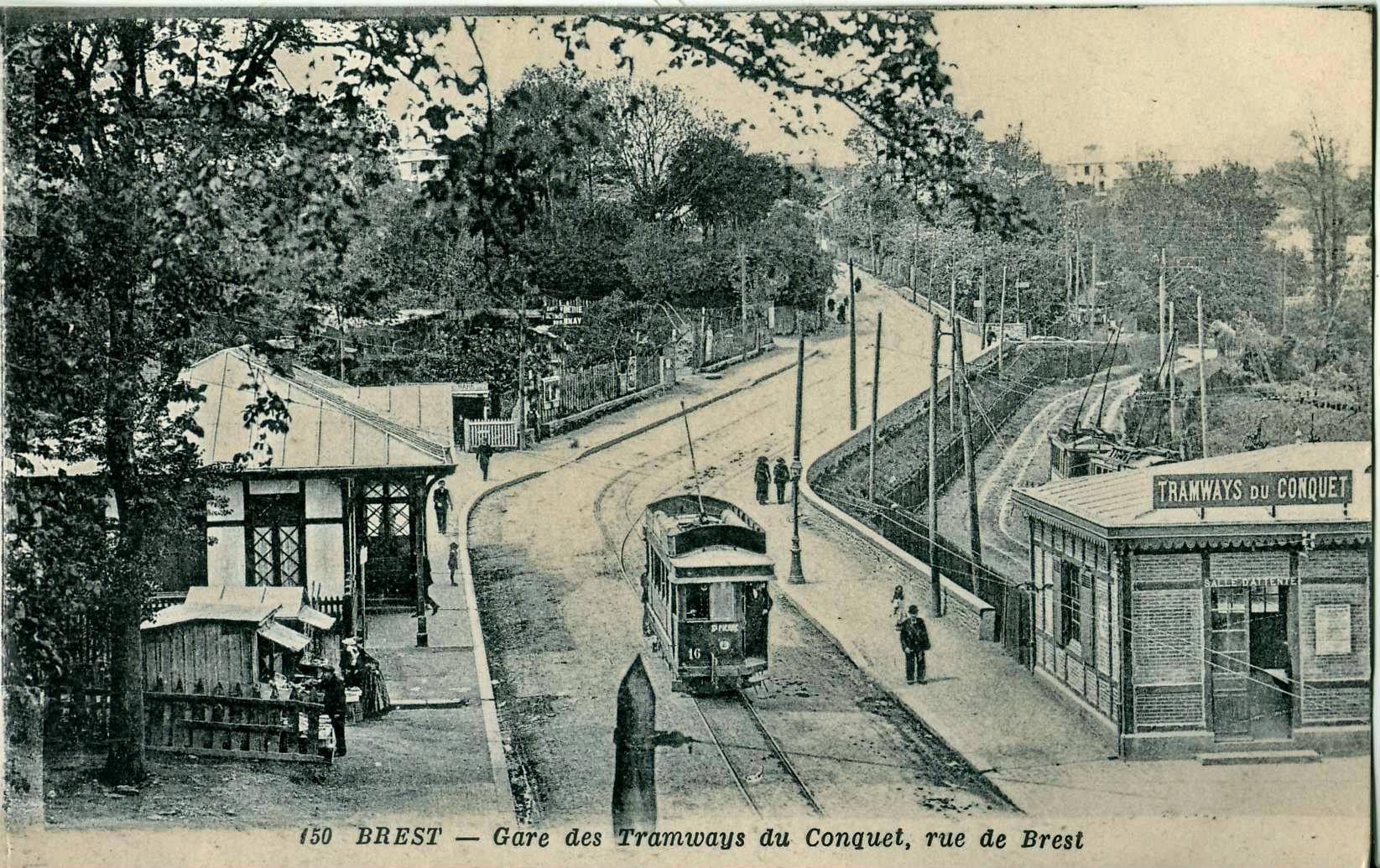 Carte postale ancienne éditée par Artaud_&_Nozais, éditeurs à Nantes n°150 : BREST - Gare des Tramways du Conquet, rue de Brest.